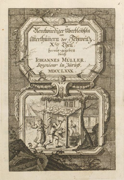 Merckwürdiger Überbleibseln von Alterthümern der Schweitz. Teil X. Frontispiz